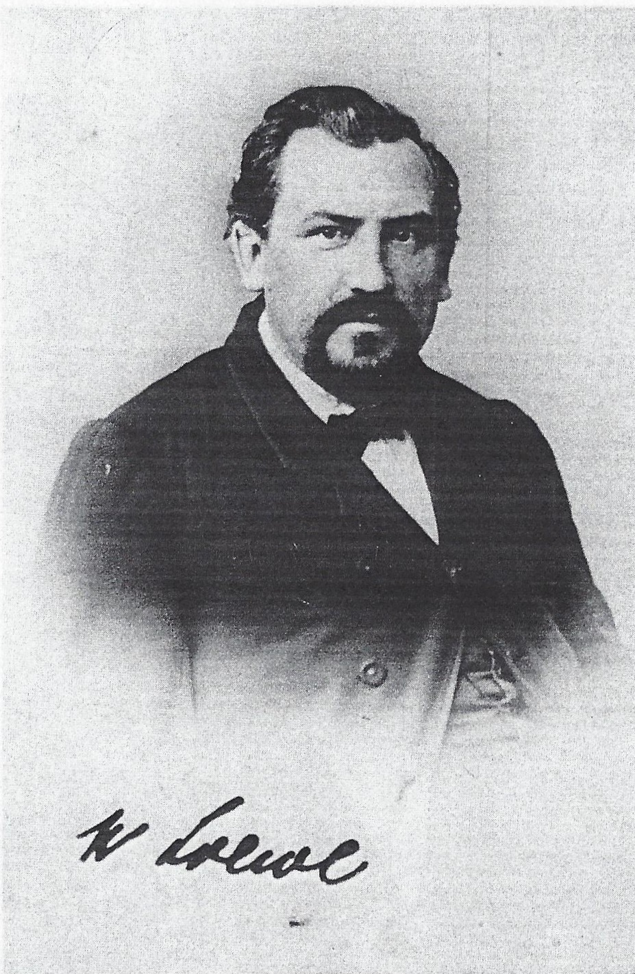 Porträtfotografie von Wilhelm Loewe (1814-1886)